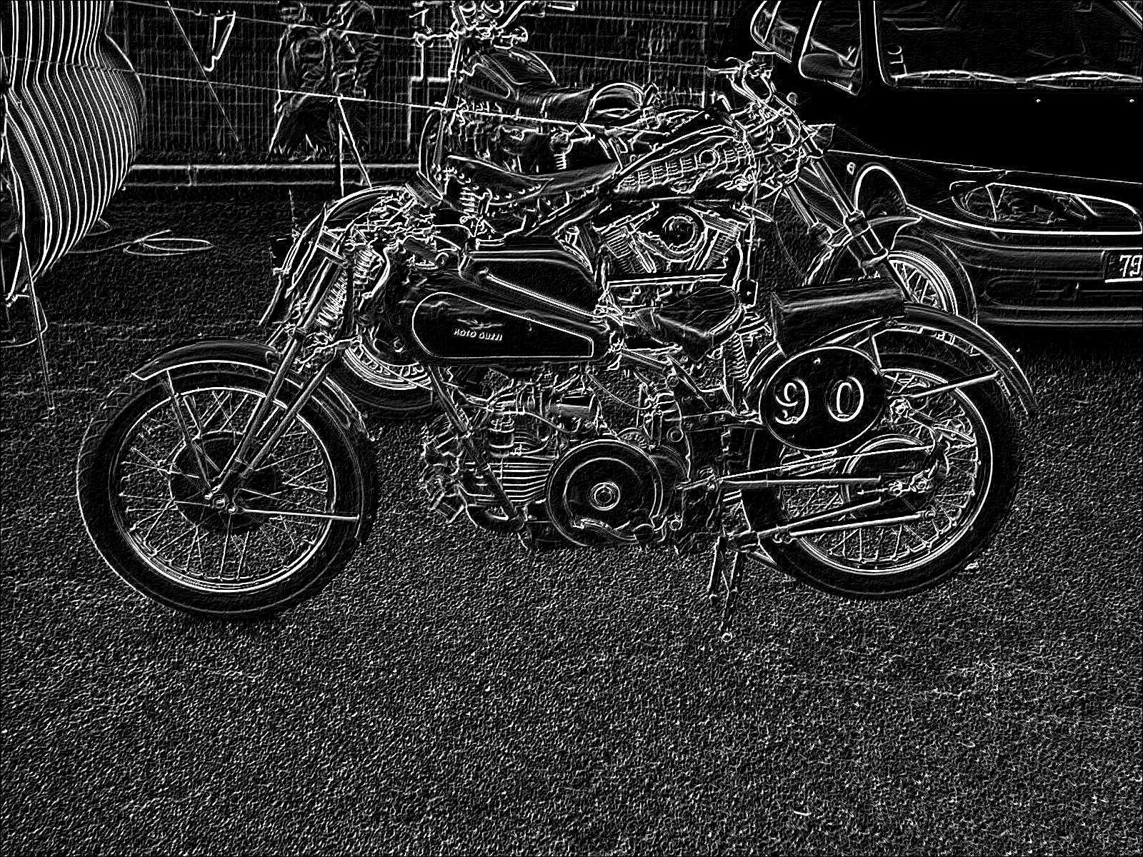 Aplicacion de un algoritmo de deteccion de bordes